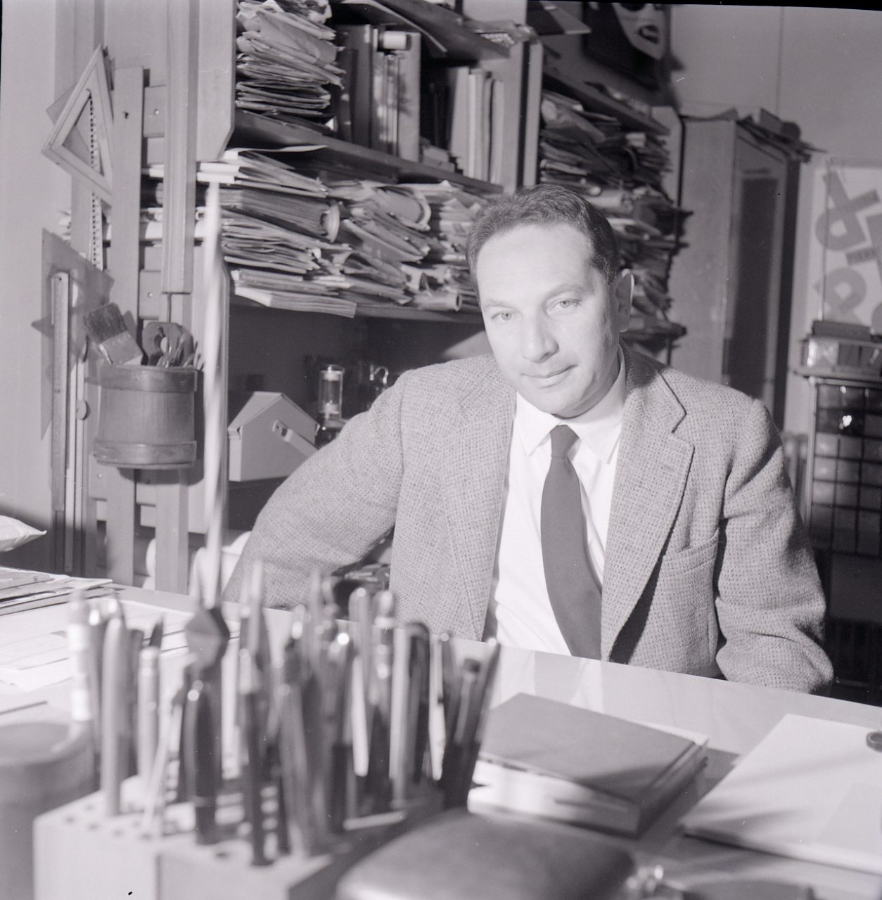 Servizio fotografico : Italia, 1973 / Paolo Monti. - Buste: 12, Fototipi: 12 : Negativo b/n, gelatina bromuro d'argento/ pellicola ; 6x6. - ((Serie costituita da 12 buste di carta, tenute insieme da graffetta, identificate con i nn.: R4509, R4510, R4511, R4512, R4513, R4514, R4515, R4516, R4517, R4518, R4519, R4520. - Sulla busta 4509: "Steiner"